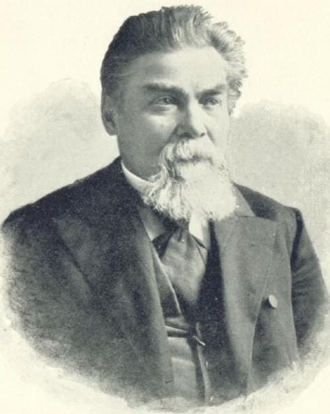 Hermenegild Jireček rytíř ze Samokova